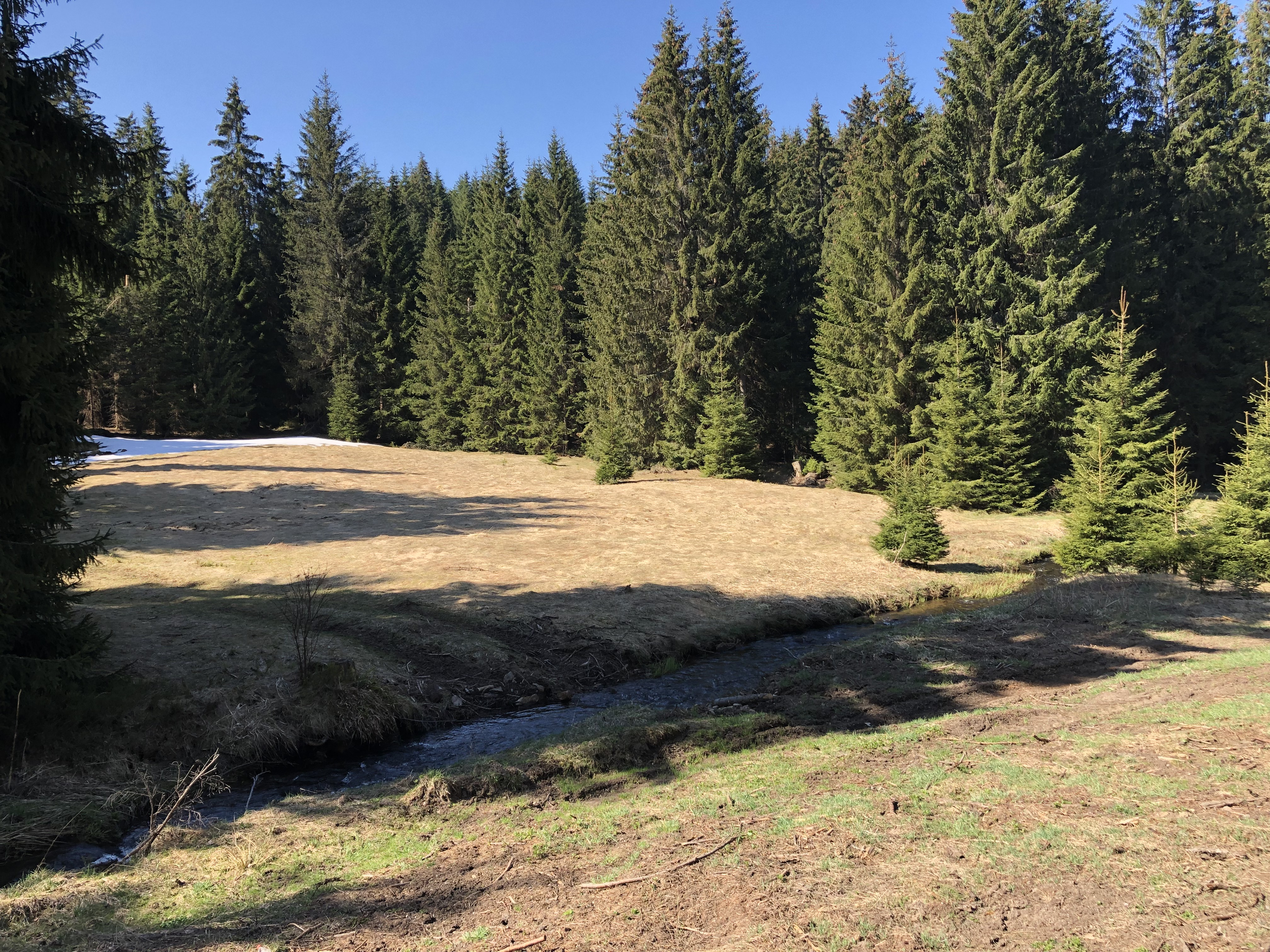 Standort des ehemaligen Oberes Blaufarbenwerk (Breitenbach), 2019